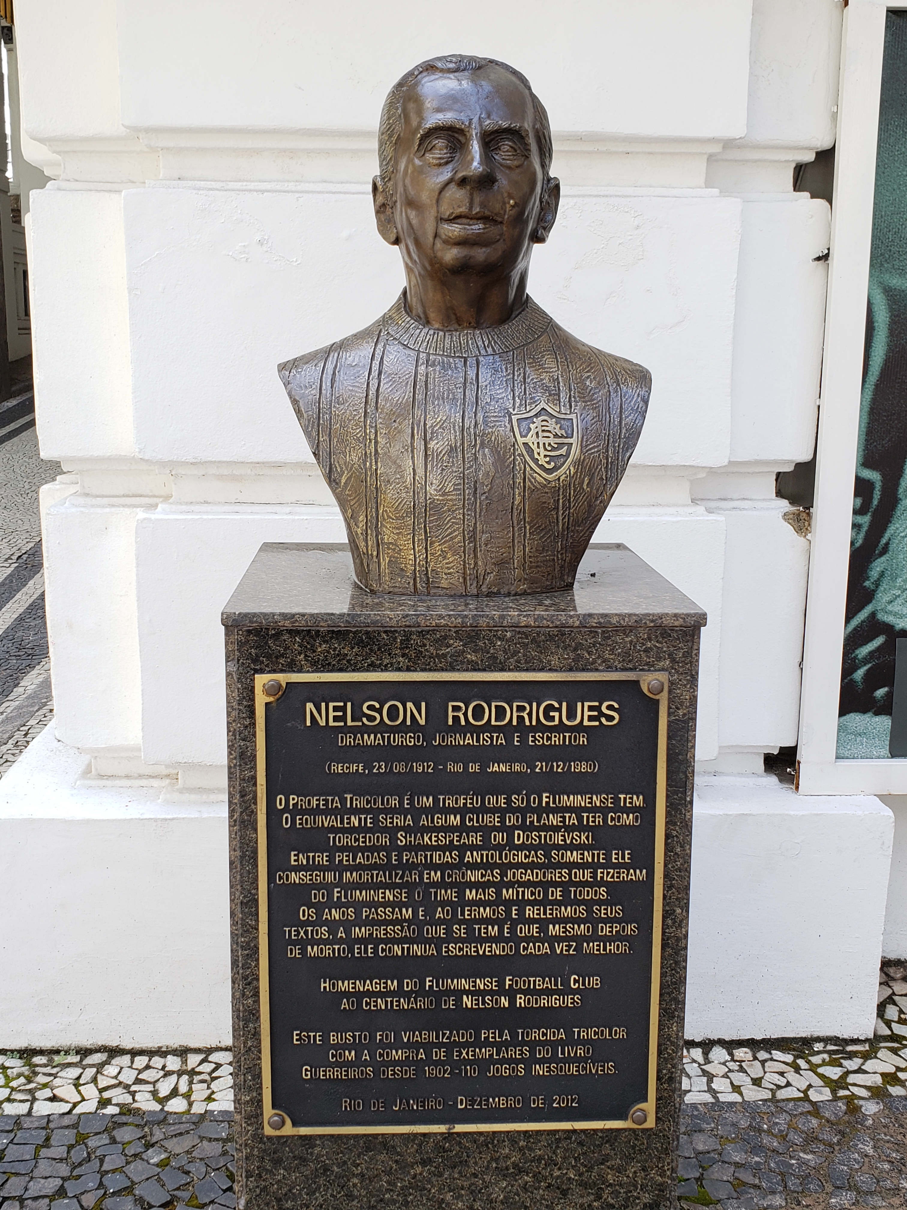 Busto de Nélson Rodrigues, jornalista, escritor, teatrólogo e fanático torcedor do Fluminense Football Club, uma espécie de Shakeaspeare brasileiro.